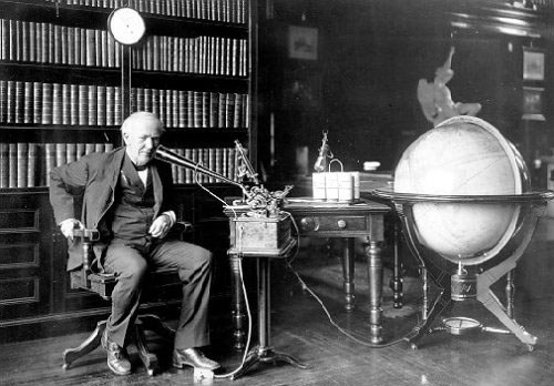 Thomas Alva Edison diktiert in seiner Bibliothek mit einem Edison Business Phonograph. Original Legende: Mr. Edison dictating in his Library